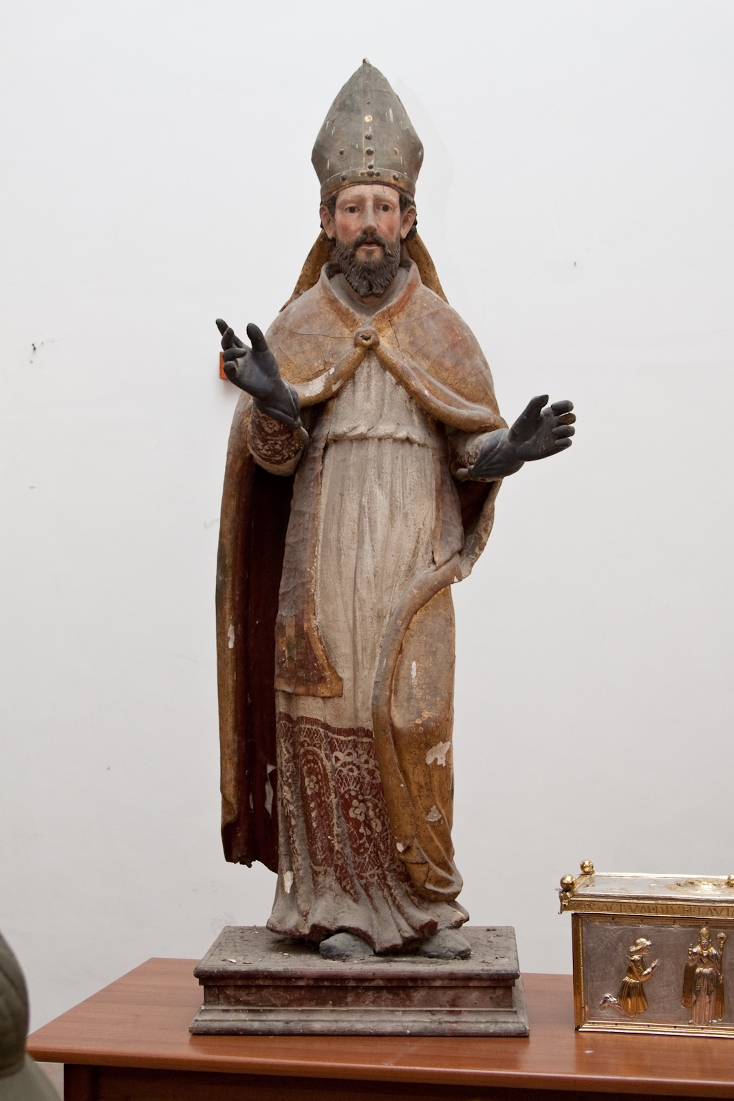 La statua del 600 raffigurante San Flaviano di Coatntinopoli conservata nel duomo di Giulianova, prima del restauro.